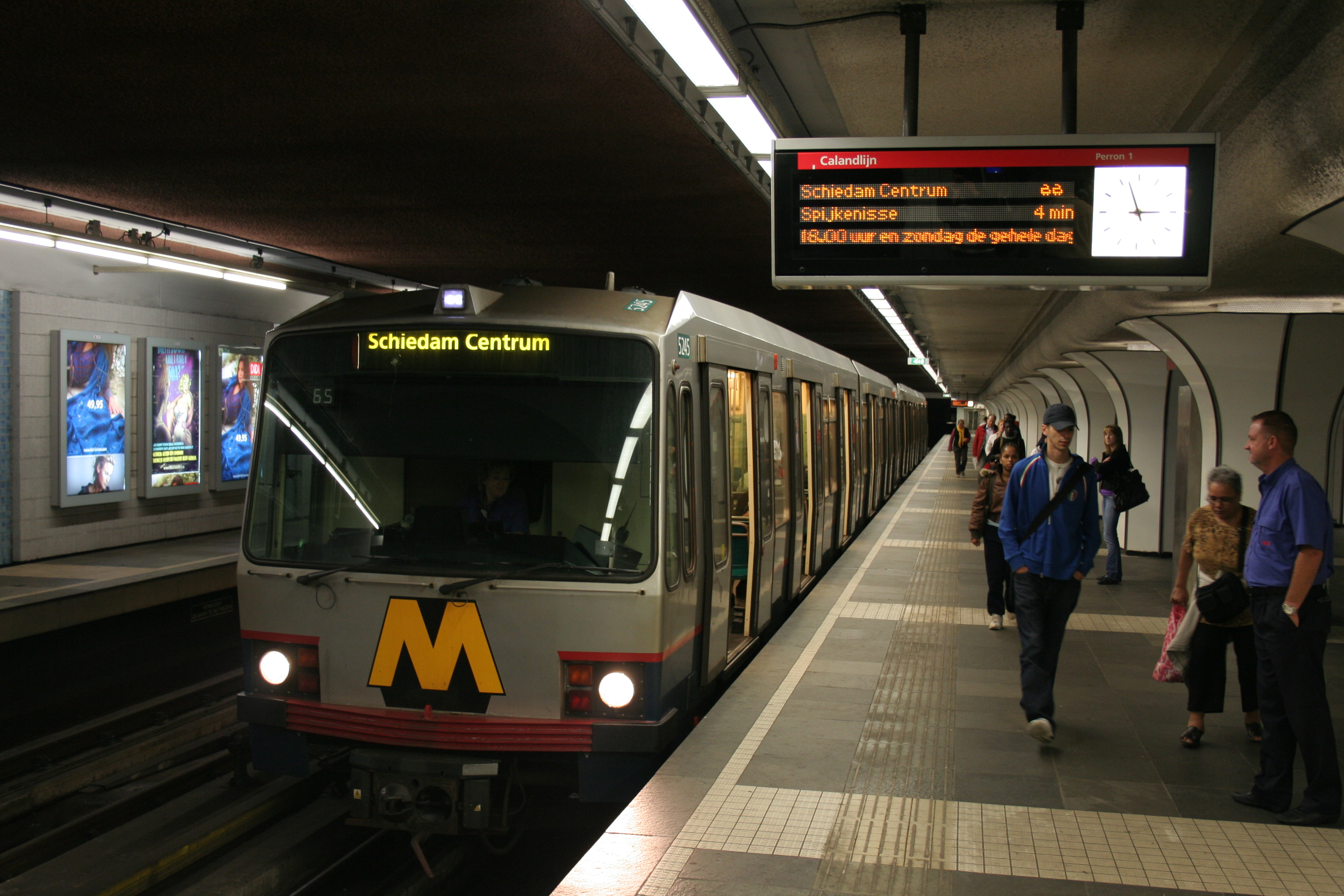 Metro bij metrostation Marconiplein.